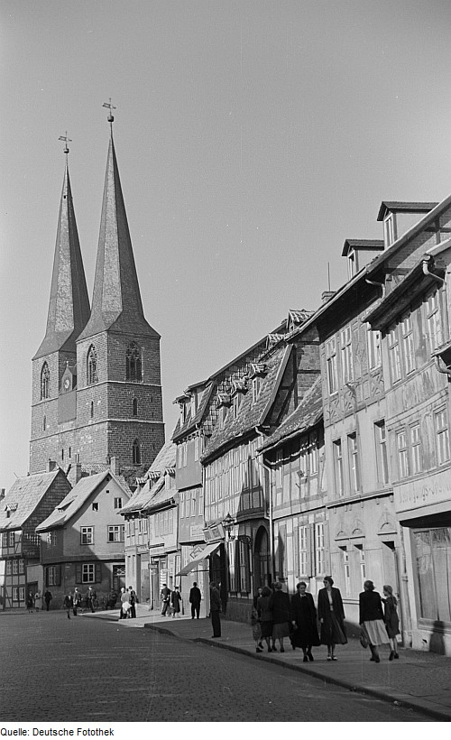 Original image description from the Deutsche Fotothek Ansicht der Pölkenstraße, im Hintergrund die Nikolaikirche